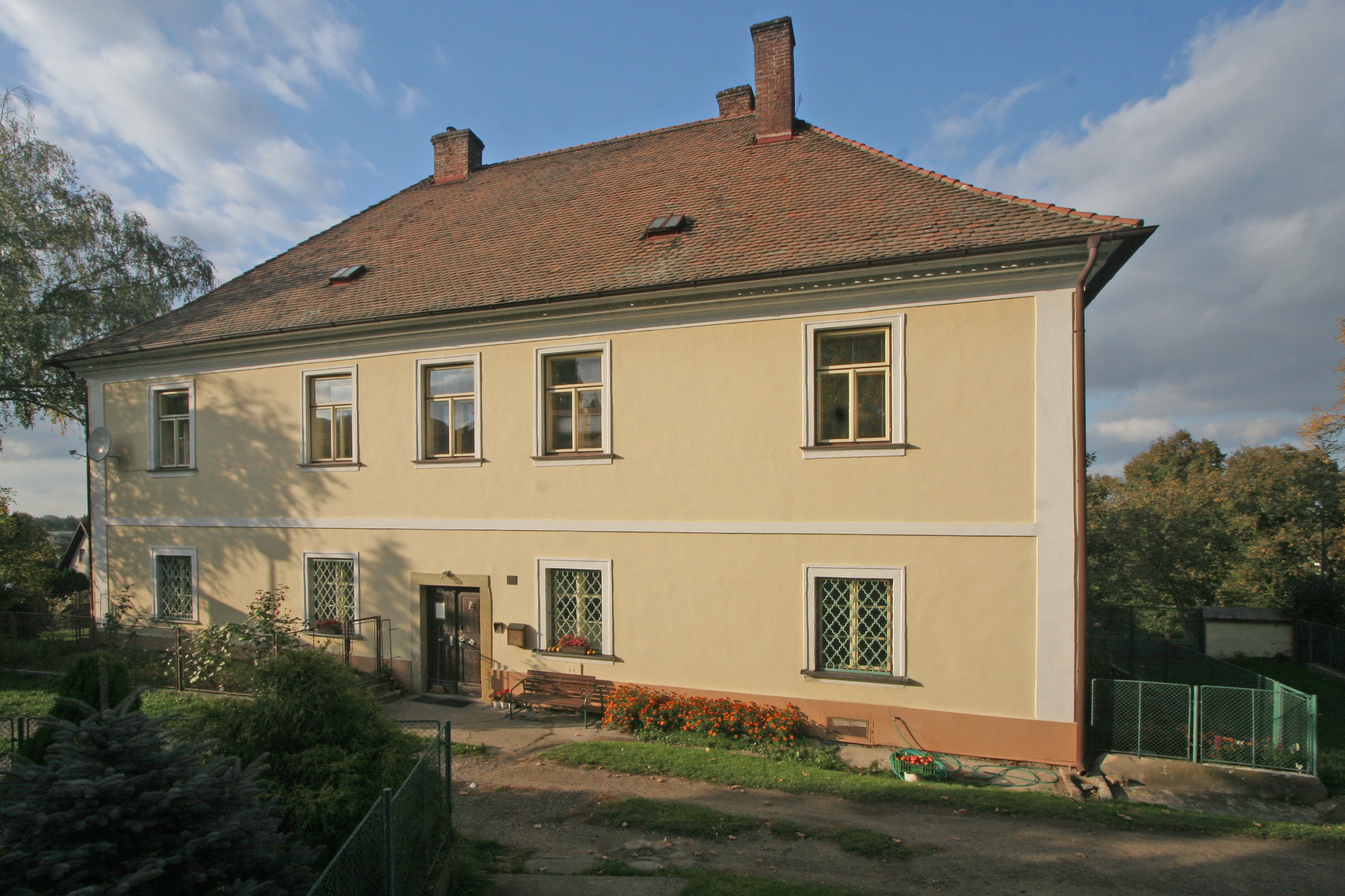 Kostel sv. Jakuba s farou (Přelouč), Masarykovo nám., Přelouč